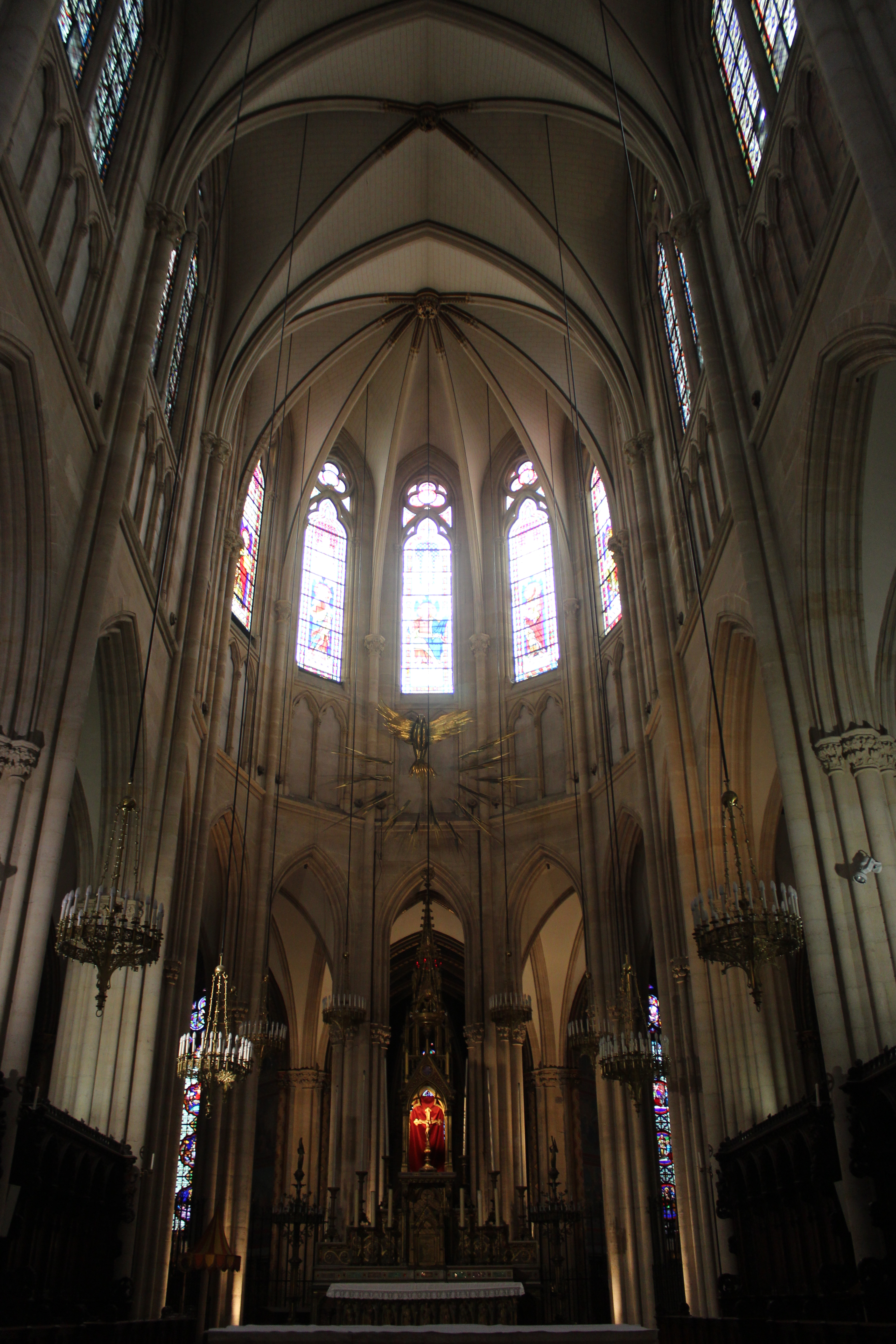 París. Basílica de Santa Clotilde.